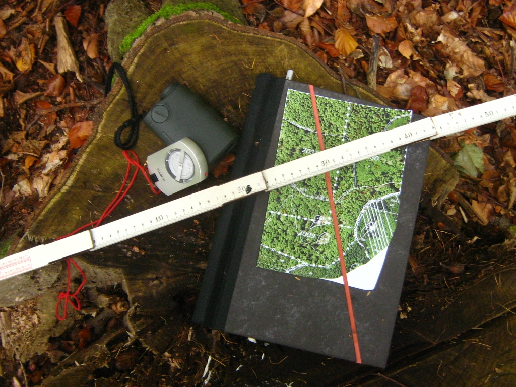 Bushnell Entfernungsmesser, Suunto Neigungs- und Höhenmesser und Bitterlichstab.